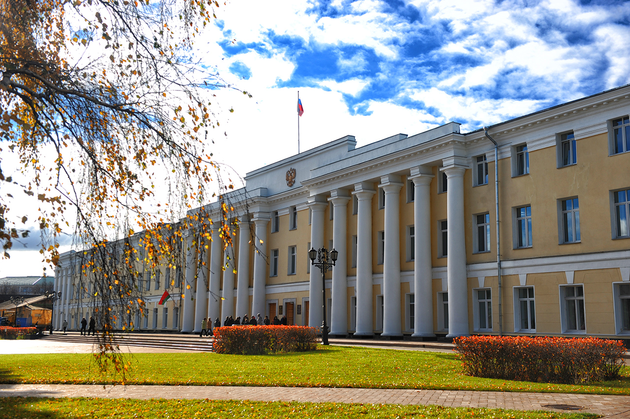 Бывшие Присутственные Места